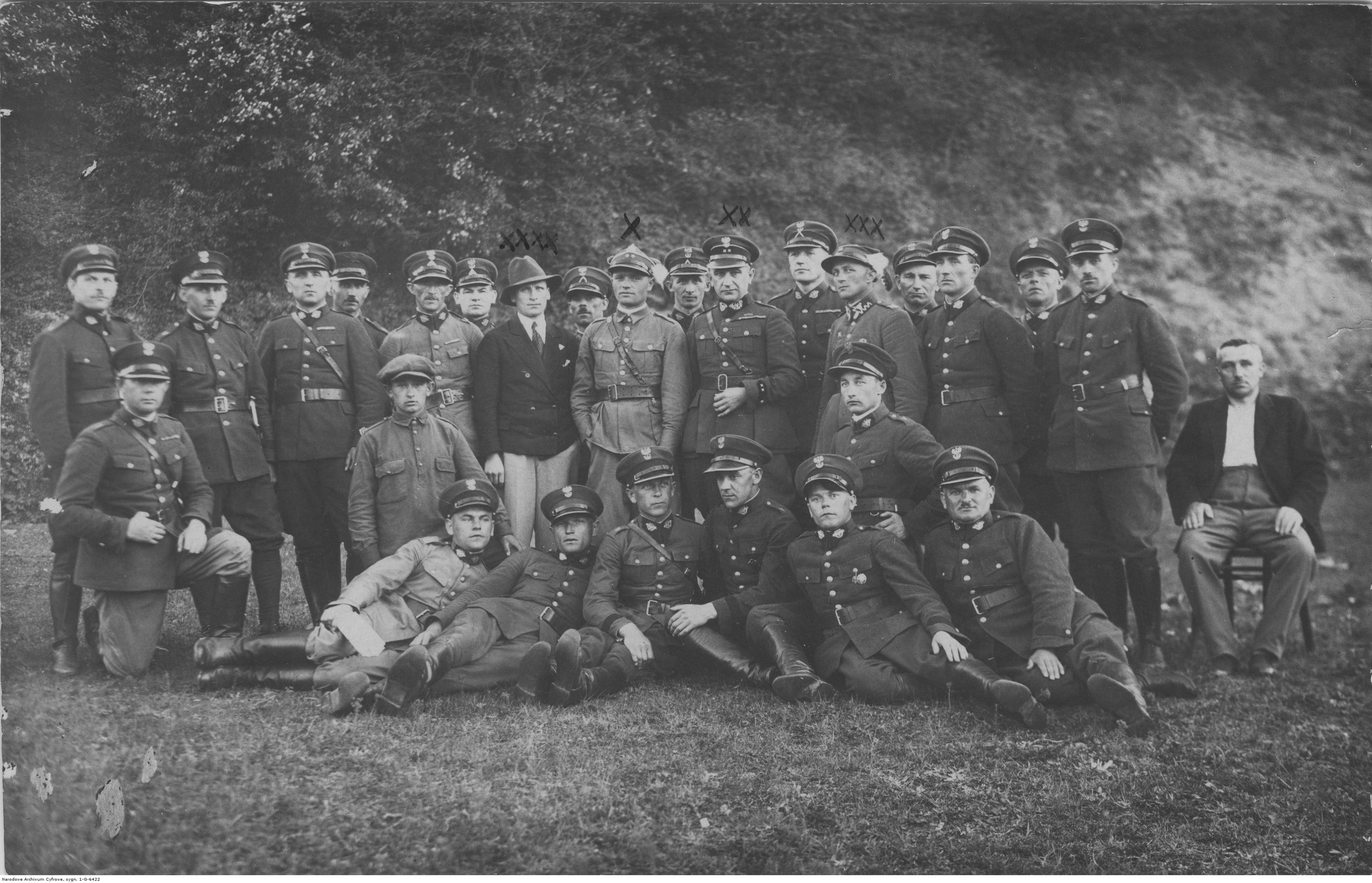 Oddział Straży Granicznej w Sanoku. Koncern Ilustrowany Kurier Codzienny - Archiwum Ilustracji. Sygnatura: 1-G-6422